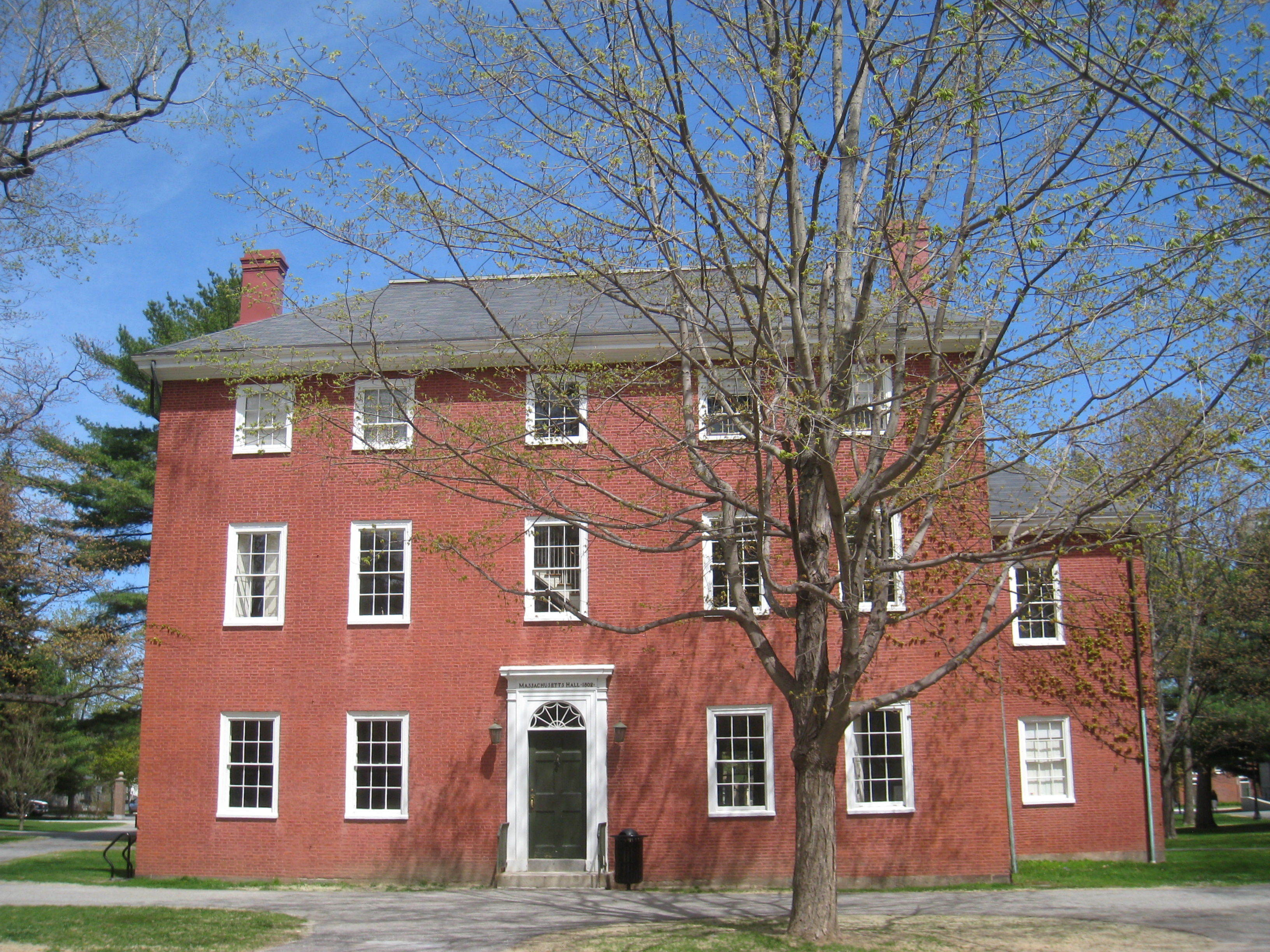 Massachusetts Hall, Bowdoin College, Brunswick, Maine, USA.